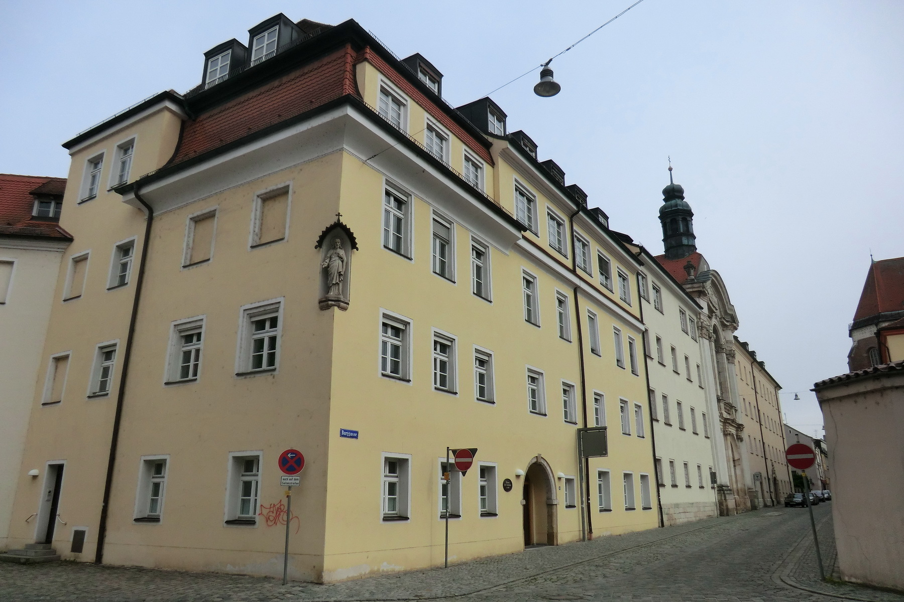 Ursulinenkirche Native nameKirche Mariä Unbefleckte Empfängnis (Ursulinenkirche)LocationStraubing, Lower Bavaria, GermanyCoordinates48° 53′ 03″ N, 12° 34′ 24″ E